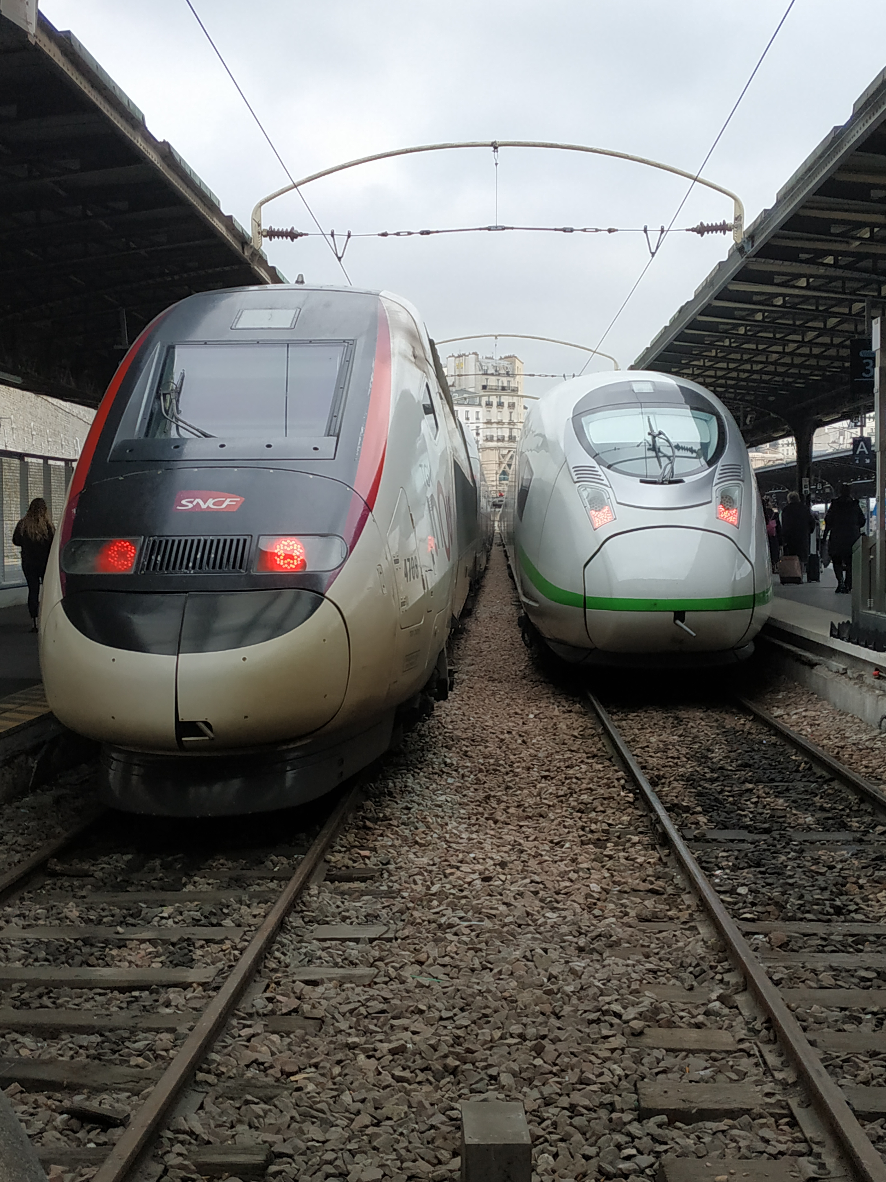 TGV 2N2 & ICE class 407 en gare de Paris-Est